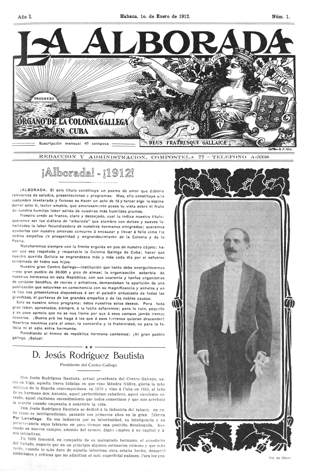 La Alborada, Habana, 1912.